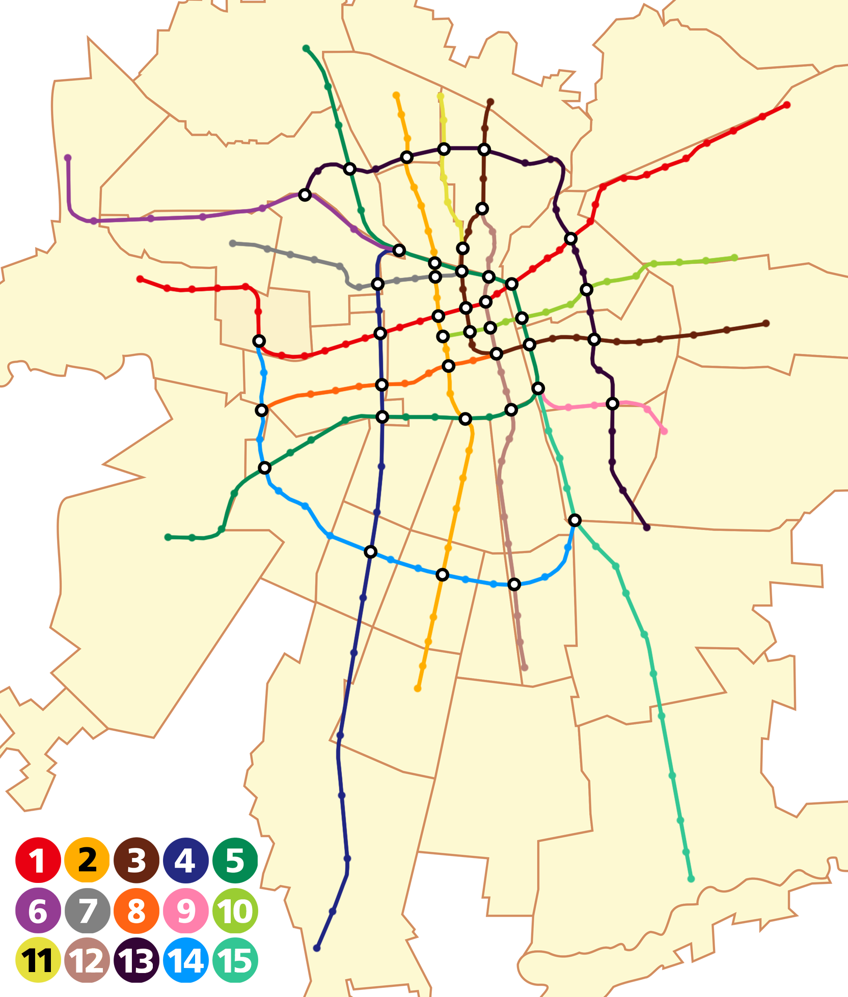 Mapa con la propuesta de Juan Parrochia para crear una Red de Transporte Independiente, con las 5 primeras líneas construidas hacia 2000, y las 10 restantes construidas hacia el año 2040, totalizando 15 líneas.